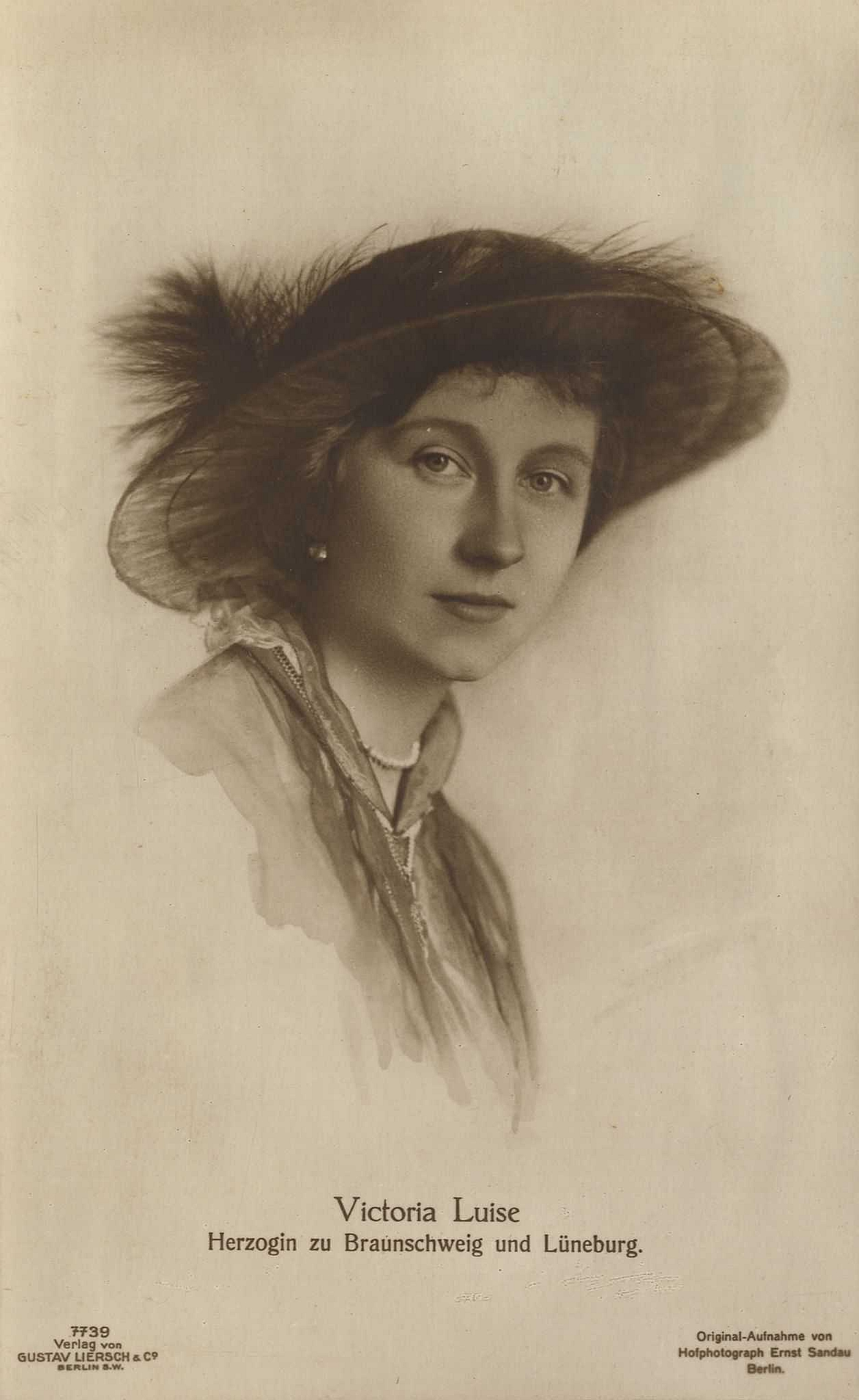 Victoria Luise, Herzogin von Braunschweig-Lüneburg.